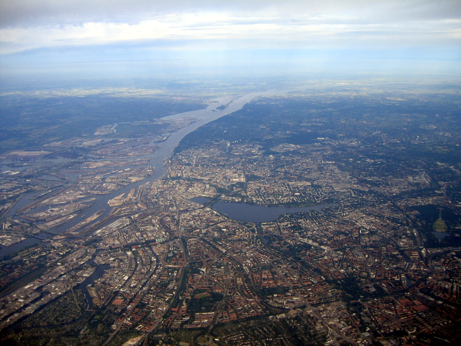 Hamburg während eines Überfluges.